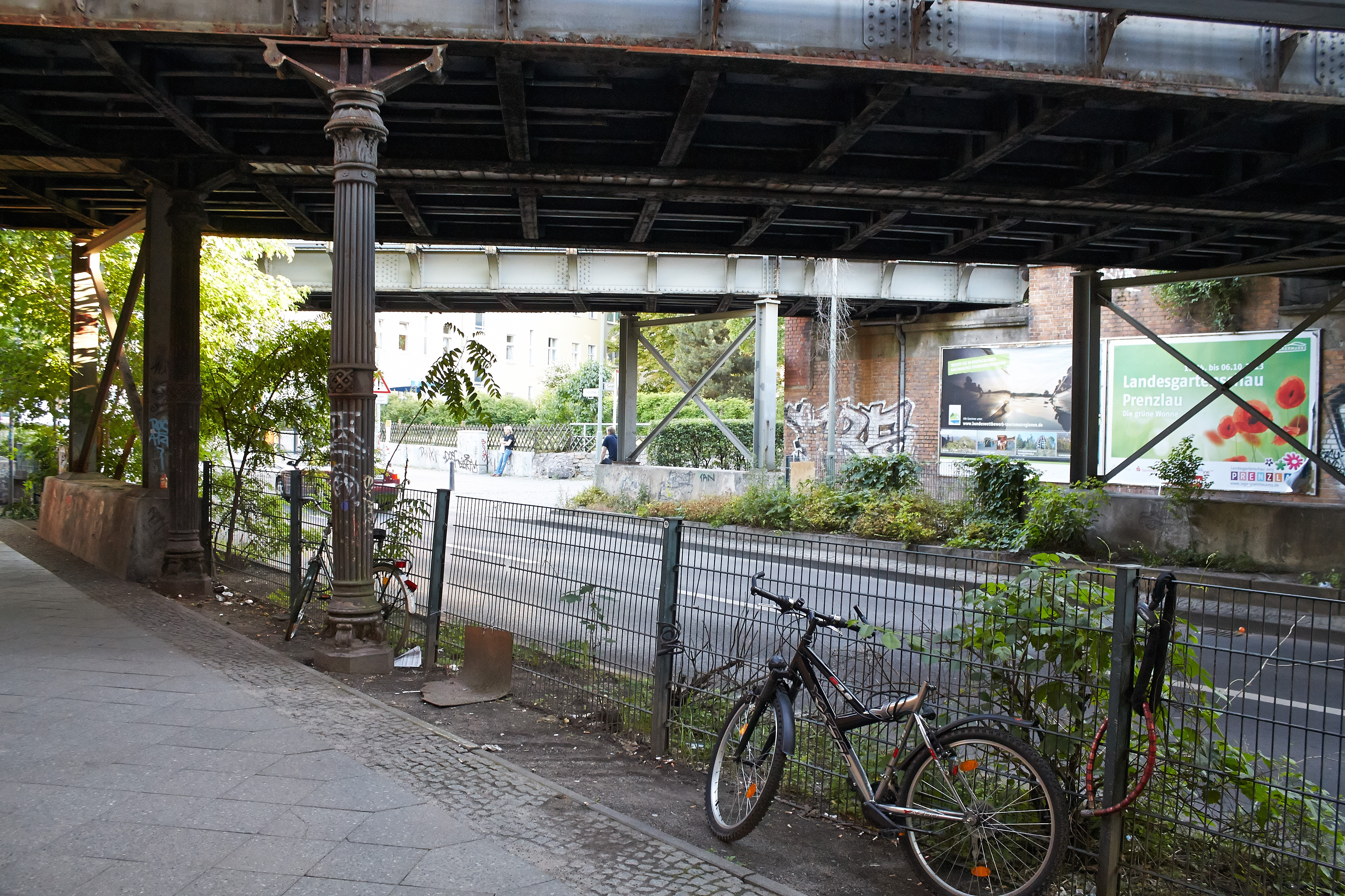 Die Fernbahnbrücke des ehemaligen Gleis Oranienburg-Stettiner Bahnhof über die Provinzstraße hat noch Hartungsche Säulen